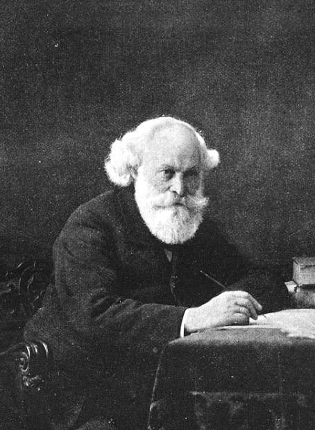 Stephan Born (1824–1898) Politiker, Redakteur der Basler Nachrichten. Fotografie von J. Höflinger und Sohn, Basel